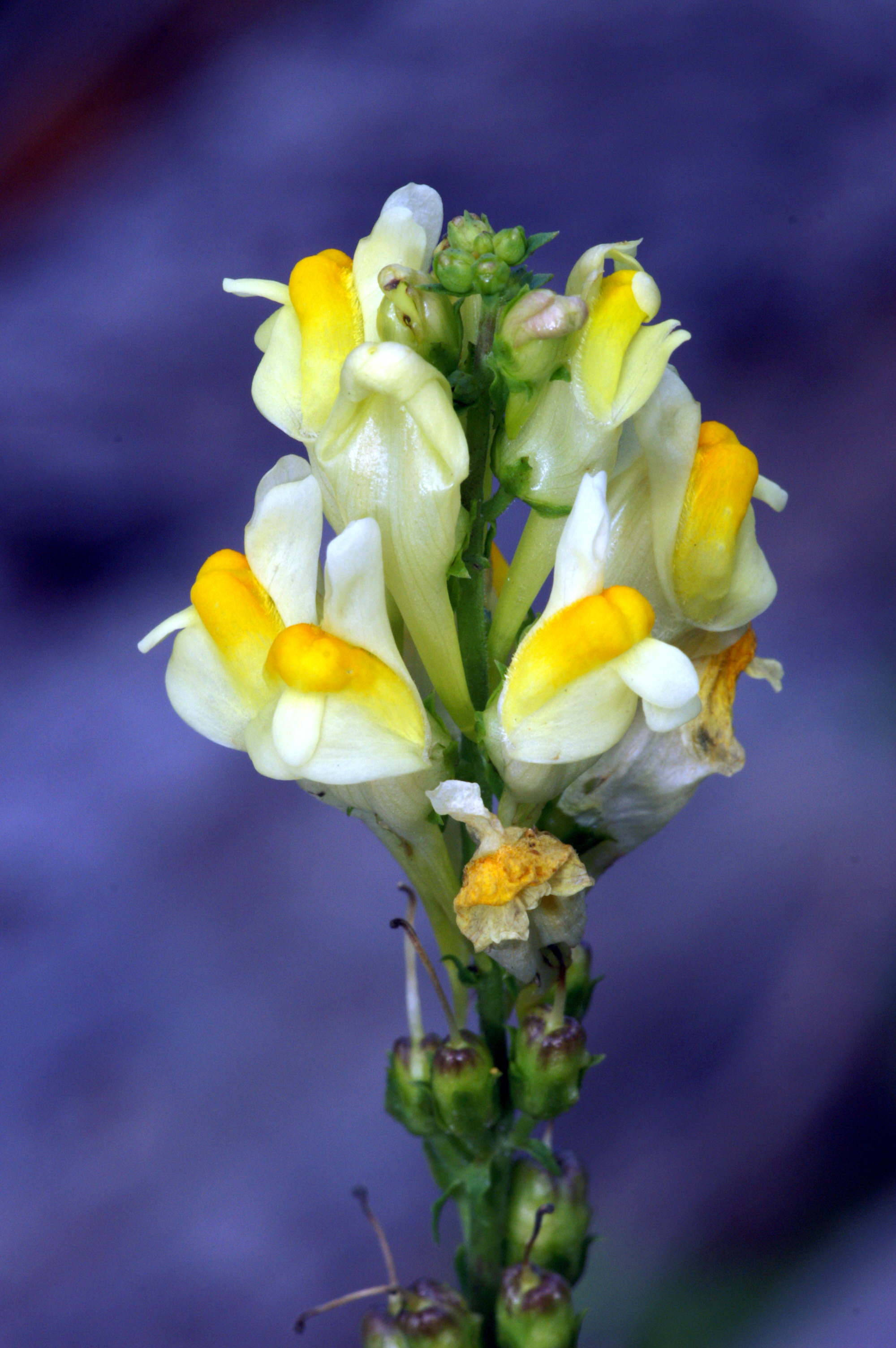 Blütenstand des Echten Leinkrauts (Linaria vulgaris)